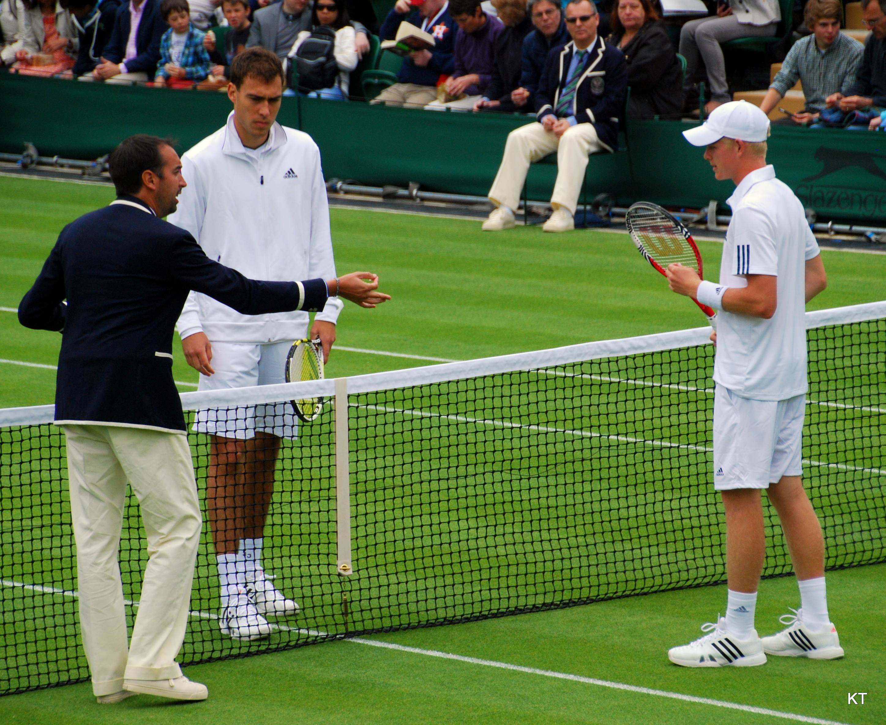 Jerzy Janowicz v Kyle Edmund on Court 3